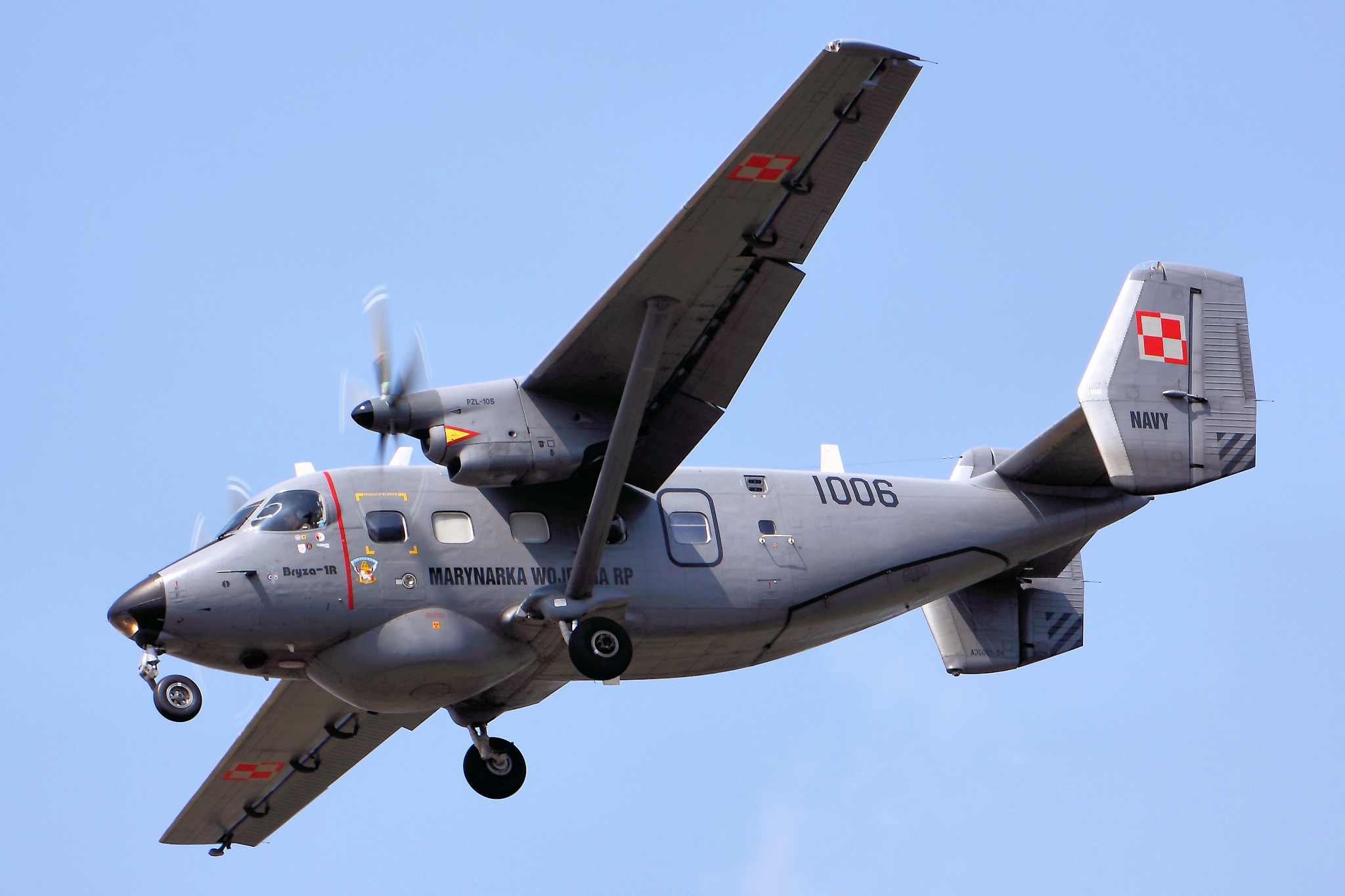 M-28 Bryza - RIAT 2013